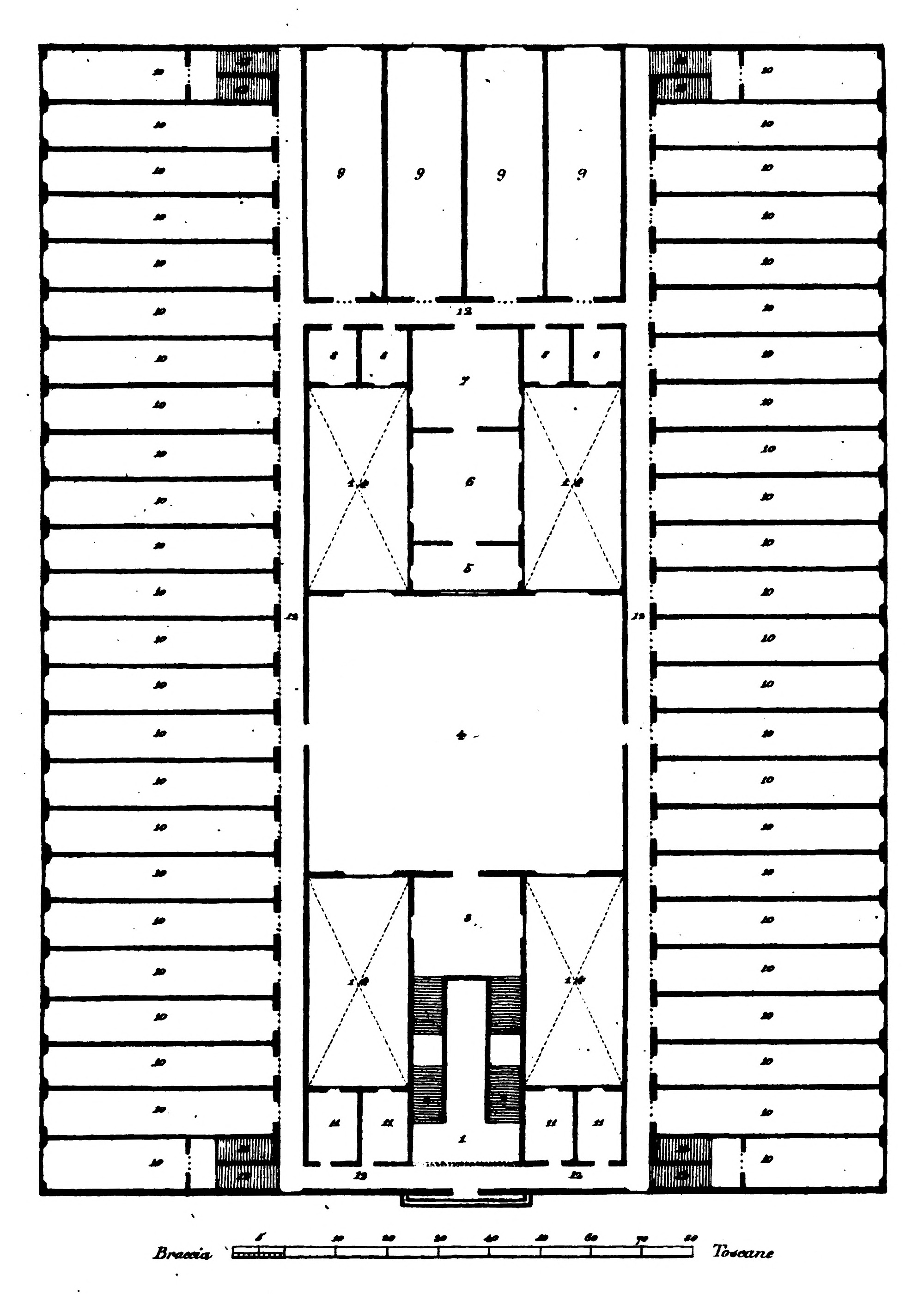 Pianta dimostrativa di pubblica universale biblioteca di Leopoldo della Santa